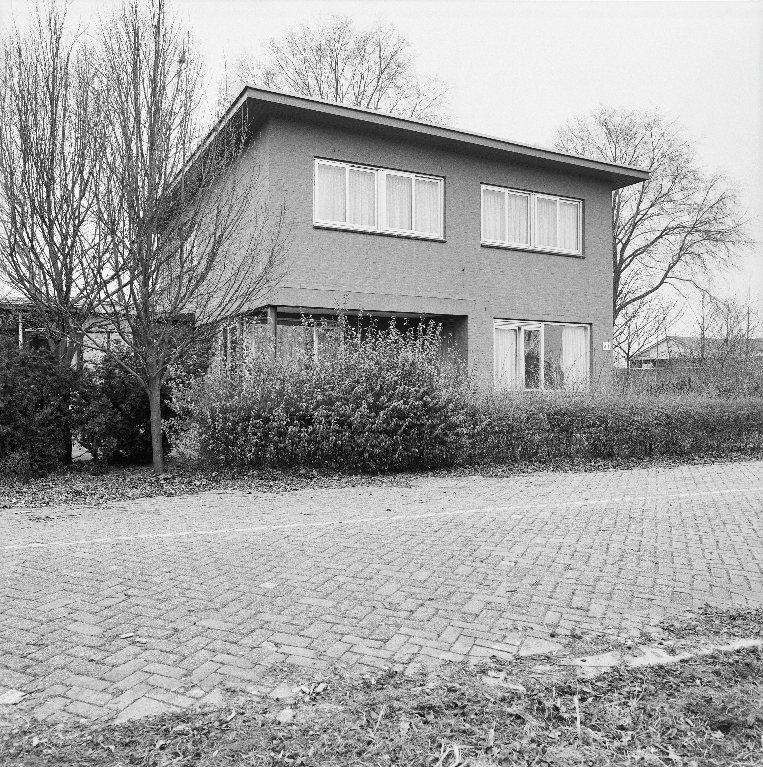 COMPLEX YPENBURG (BRINKMAN & VAN DE VLUGT): Exterieur DIENSTWONING, VOORGEVEL